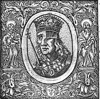 Václav I.